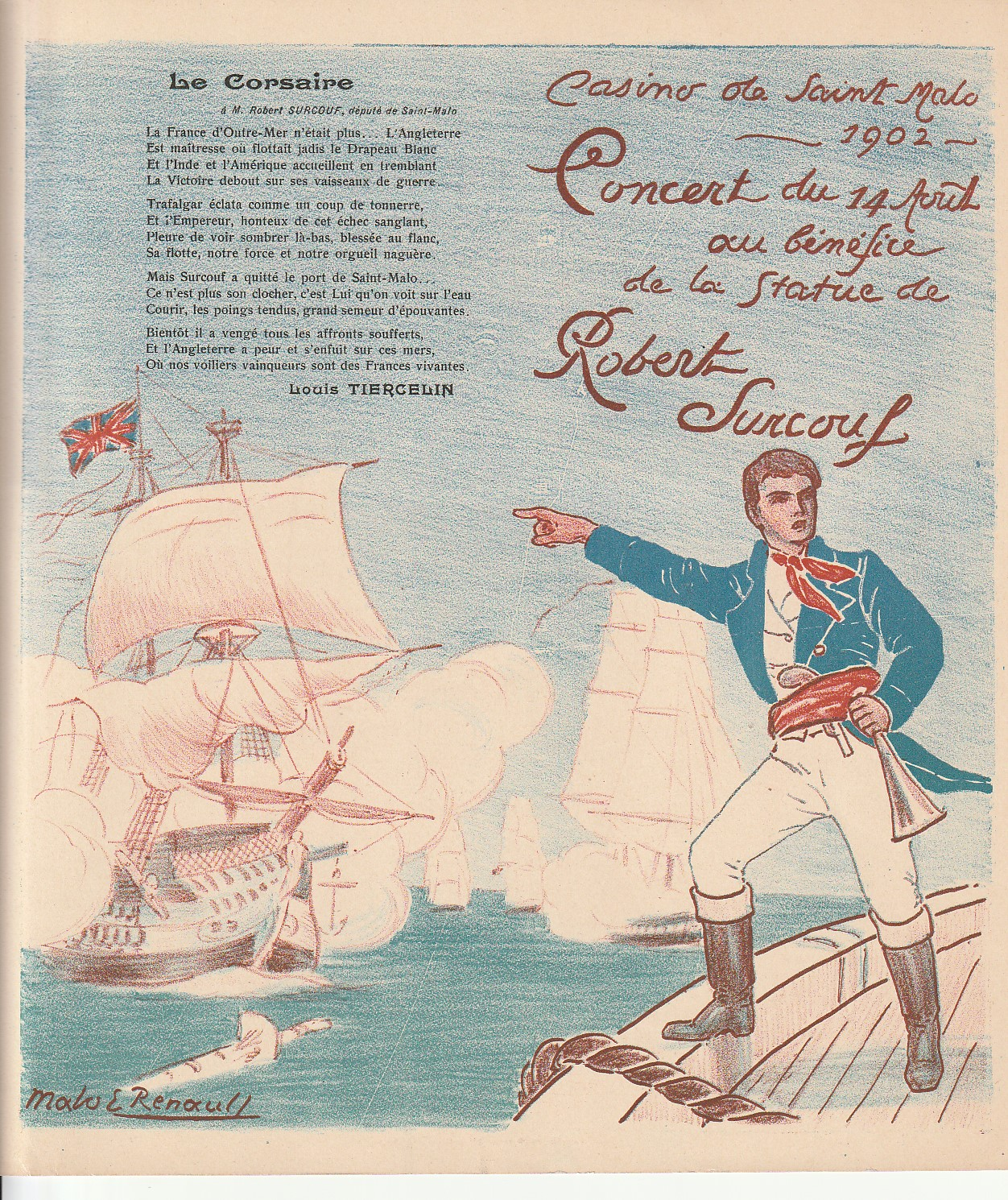 "Carton" du Concert du 14 Aout au bénéfice de la statue de Robert Surcouf[1] Casino de Saint-Malo